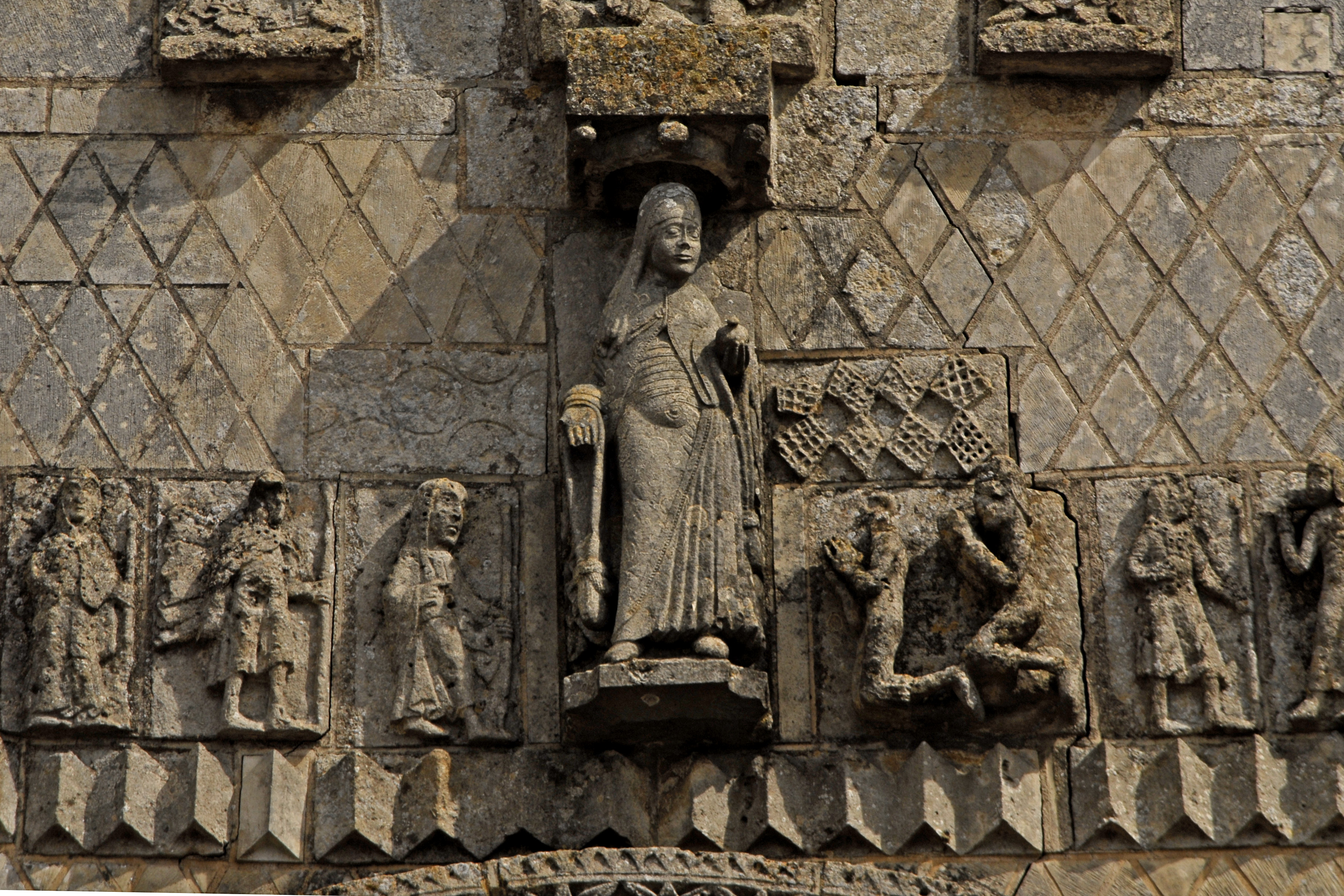 Saint-Jouin-de-Marnes, Die Muttergottes empfängt die Auferstandenen